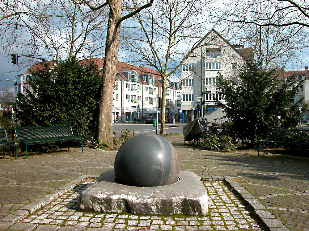 Auf Wasser gleitende Steinkugel, Düsseldorf-Benrath; en: Floating stone Spheres, Düsseldorf-Benrath